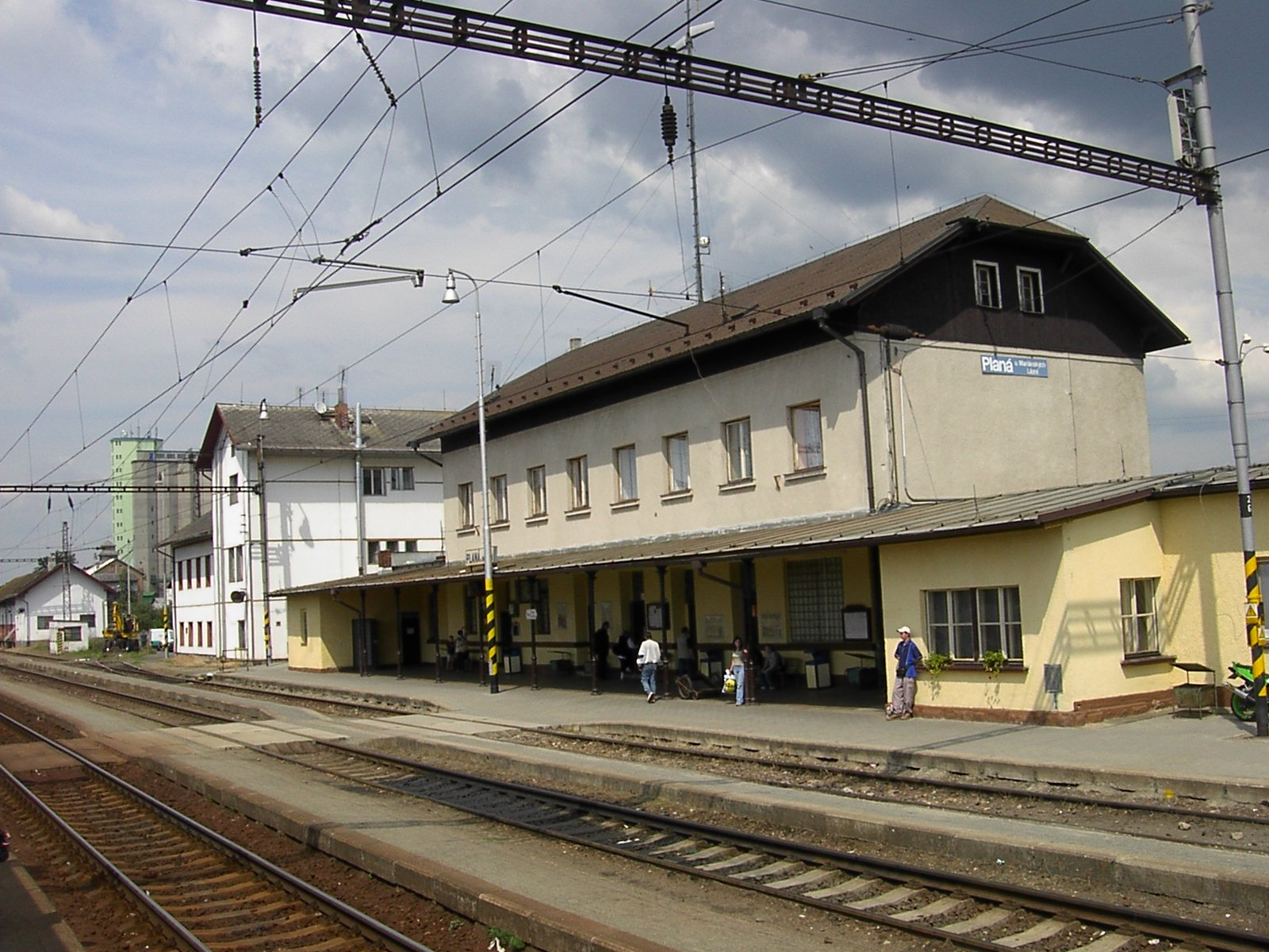 Railway station of Planá u Mariánských Lázní, Tachov district, Czech rep.